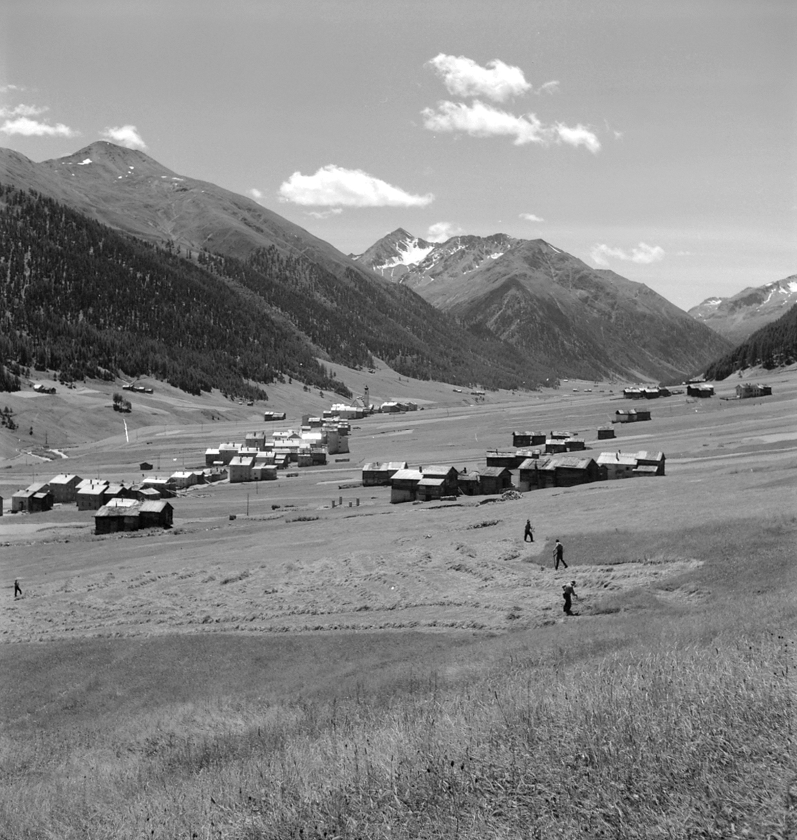 Serie fotografica : Livigno, 1975 / Paolo Monti. - Buste: 10, Fototipi: 10 : Negativo b/n, gelatina bromuro d'argento/ pellicola ; 6x6. - ((Serie costituita da 10 buste di negativi identificate con i nn.: 2309, 2311, 2312, 2314, 2315, 2316, 2317, 2318, 2319, 2320, e tenute insieme da una graffetta. - La busta denominata R 2309 riporta l'iscrizione: "Lavori/ campestri". . - Le buste hanno una doppia numerazione; l'iscrizione inventariale manoscritta a penna biro (es. S3/ 10-85; -86...) è successiva a quella attribuita da Monti a pennarello nero (es. R 2309).